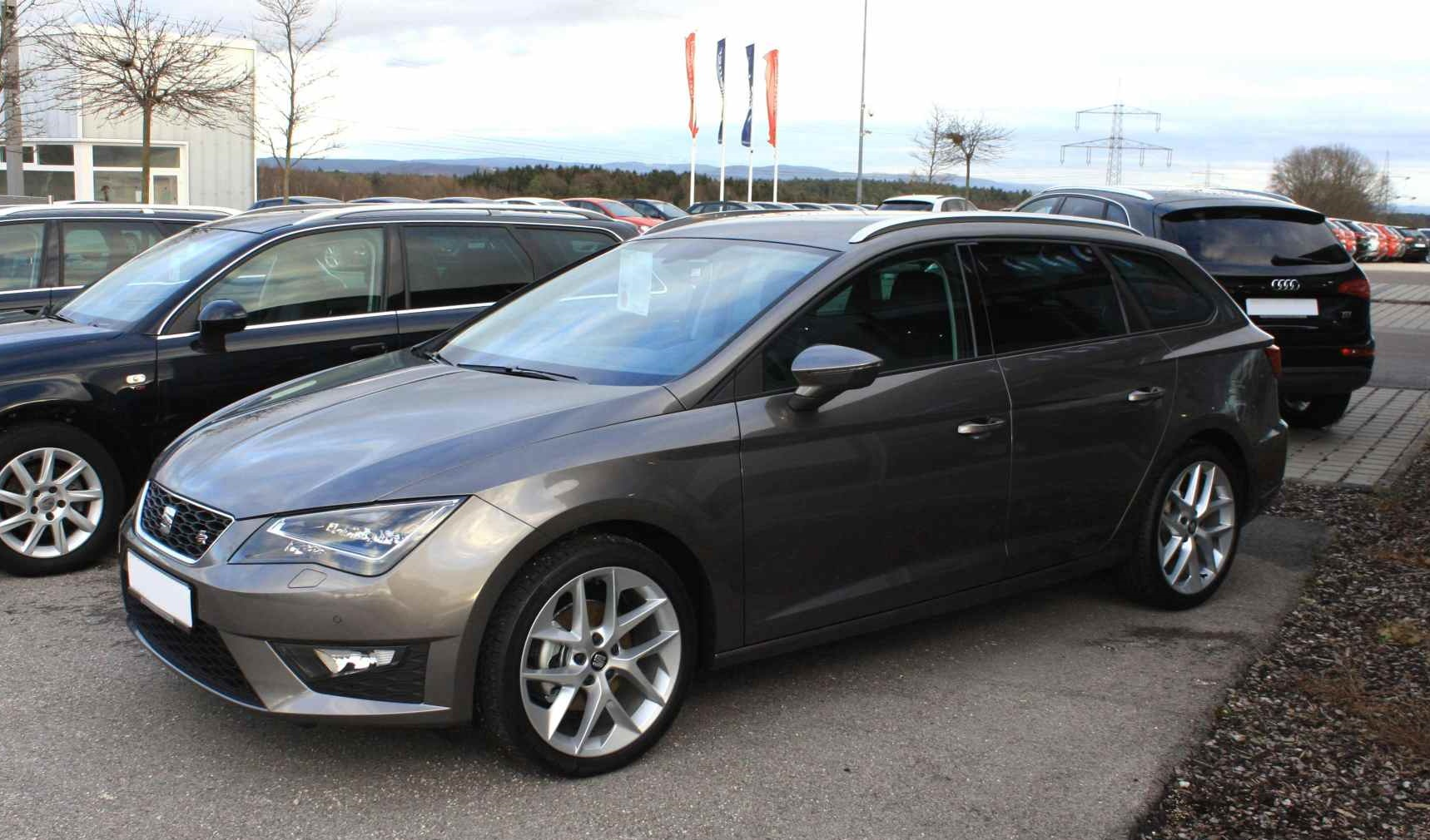 Seat Leon ST 2013